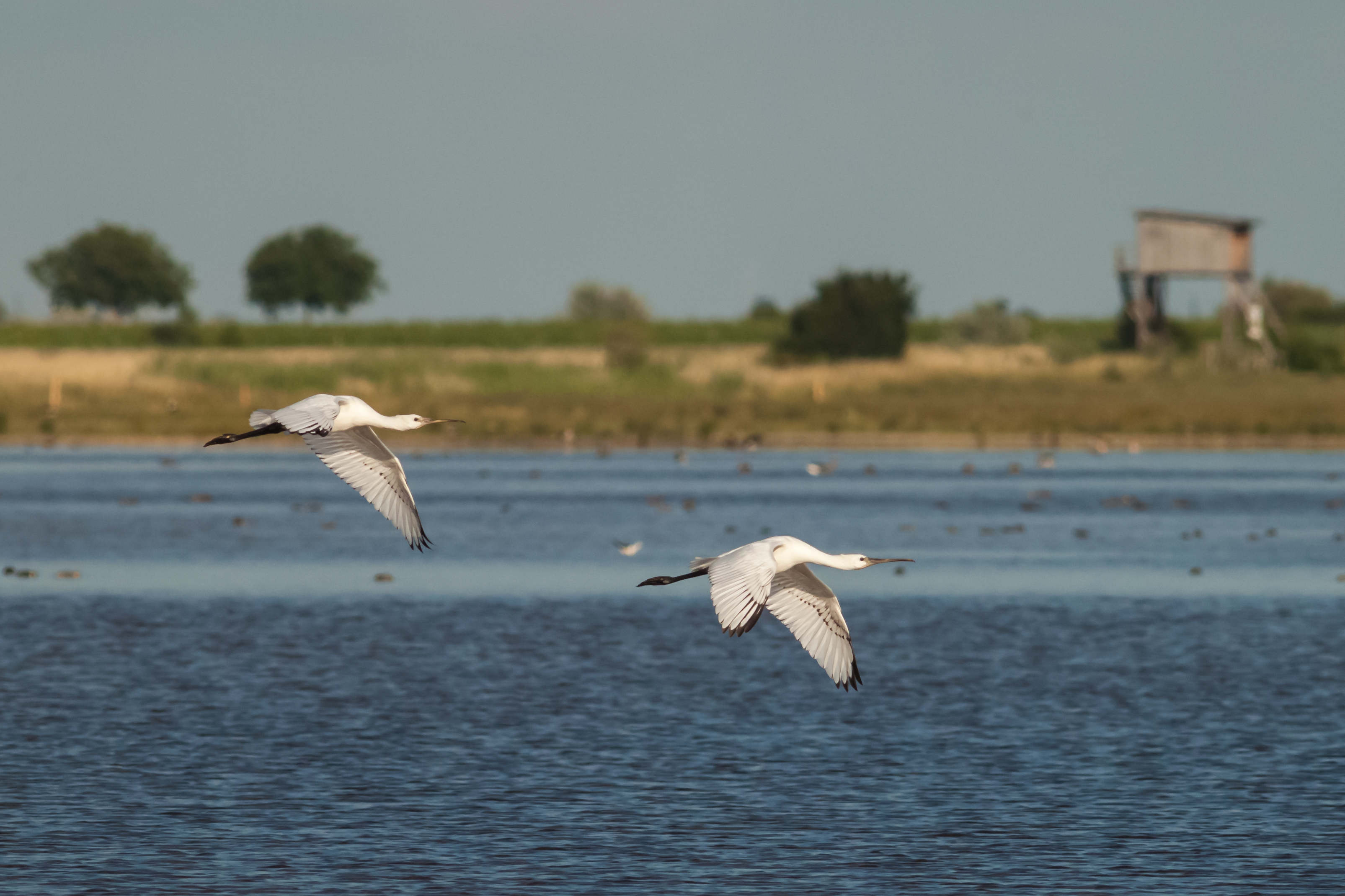 Zwei junge Löffler im Landeanflug an einer Lacke im Seewinkel, im Hintergrund einer der vielen Türme zur Vogelbeobachtung This file shows the National Park Neusiedler See-Seewinkel in Austria.